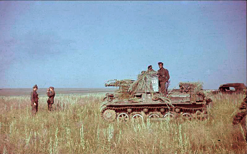 Kurze Pause einer Mot-Einheit West-Ukraine 1941